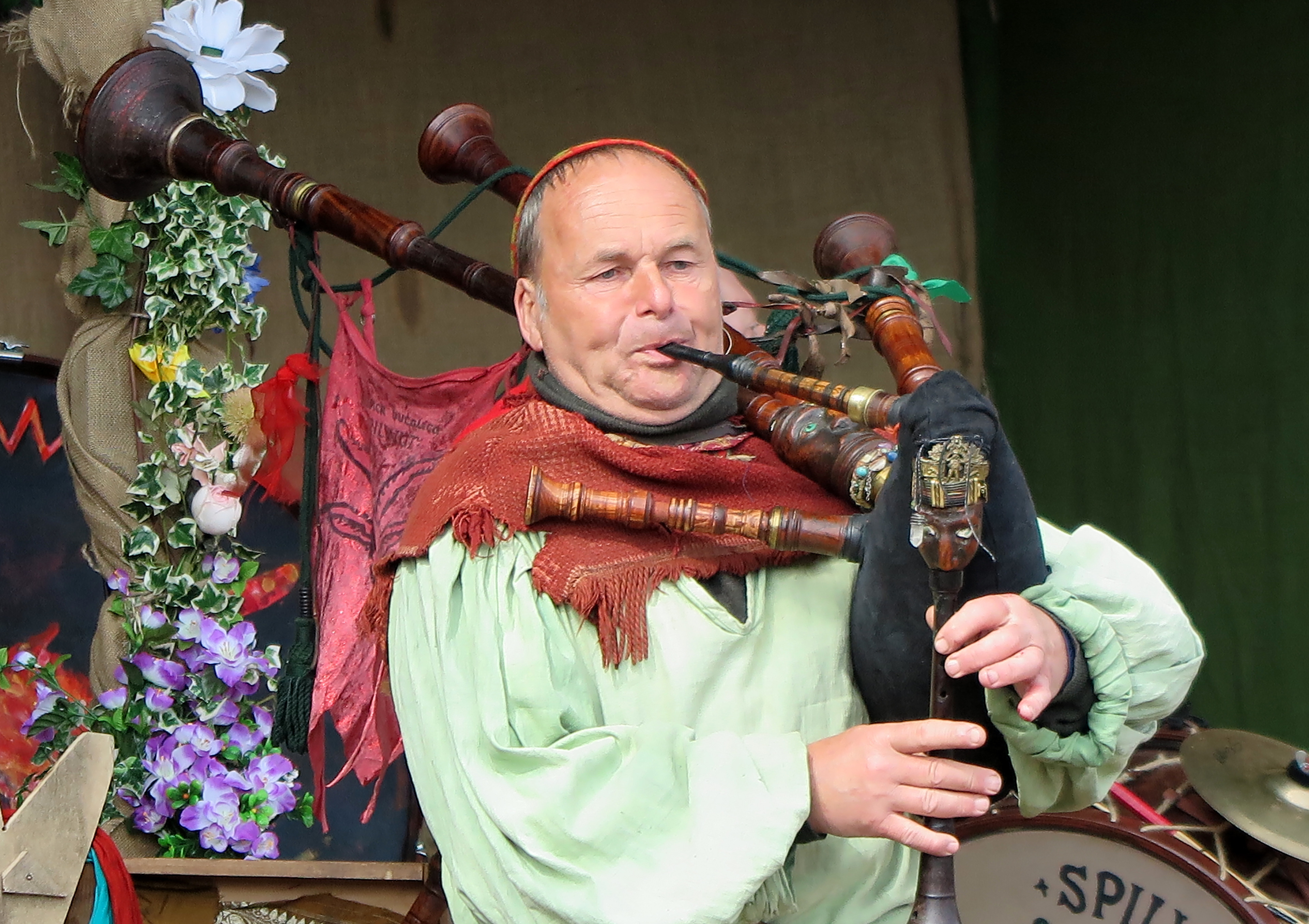 Mittelaltermusik - Gruppe Spilwut - Ostern Chorin